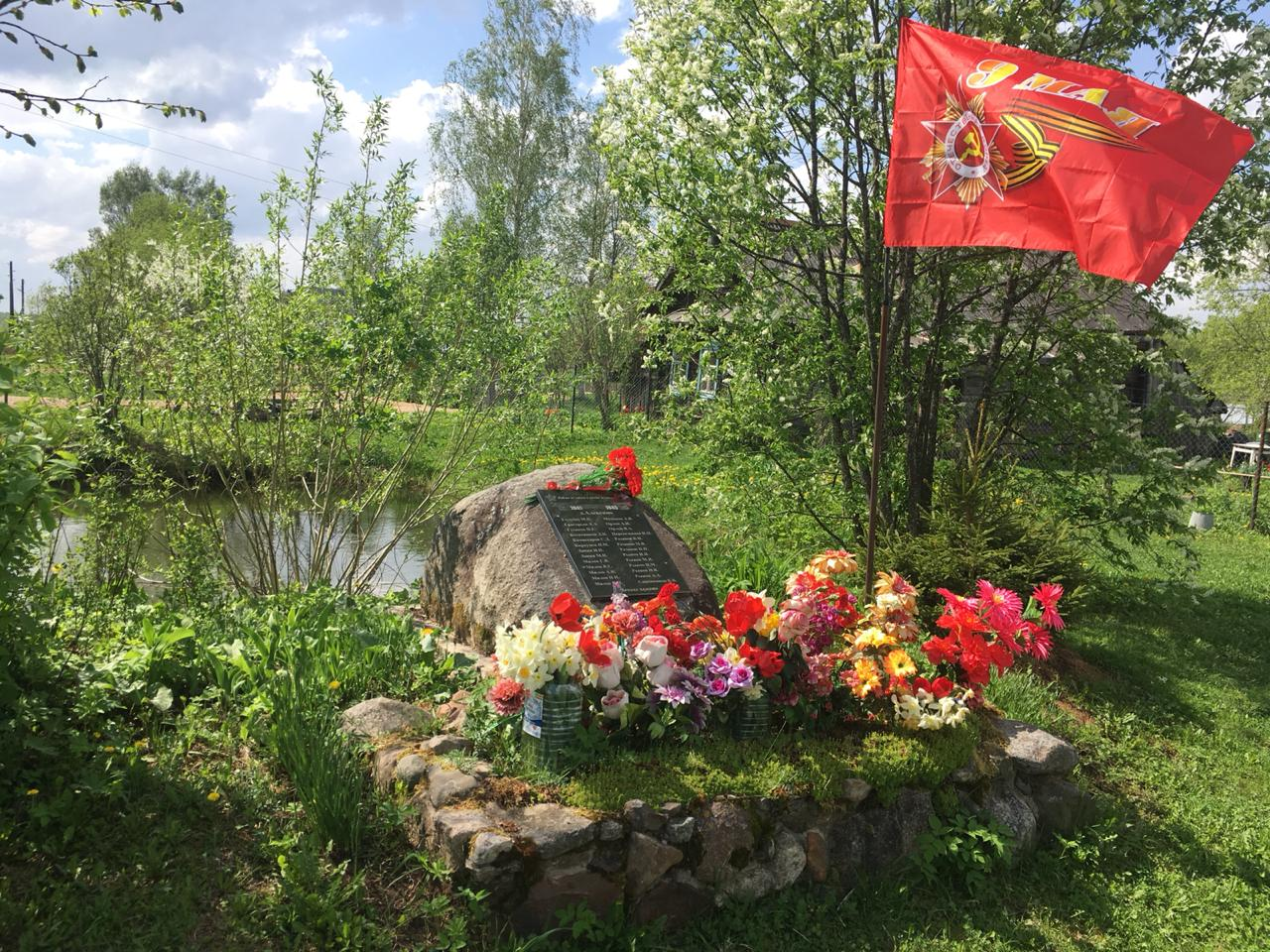 Памятник погибшим односельчанам в д. Алексино (Калязинский район Тверская область)